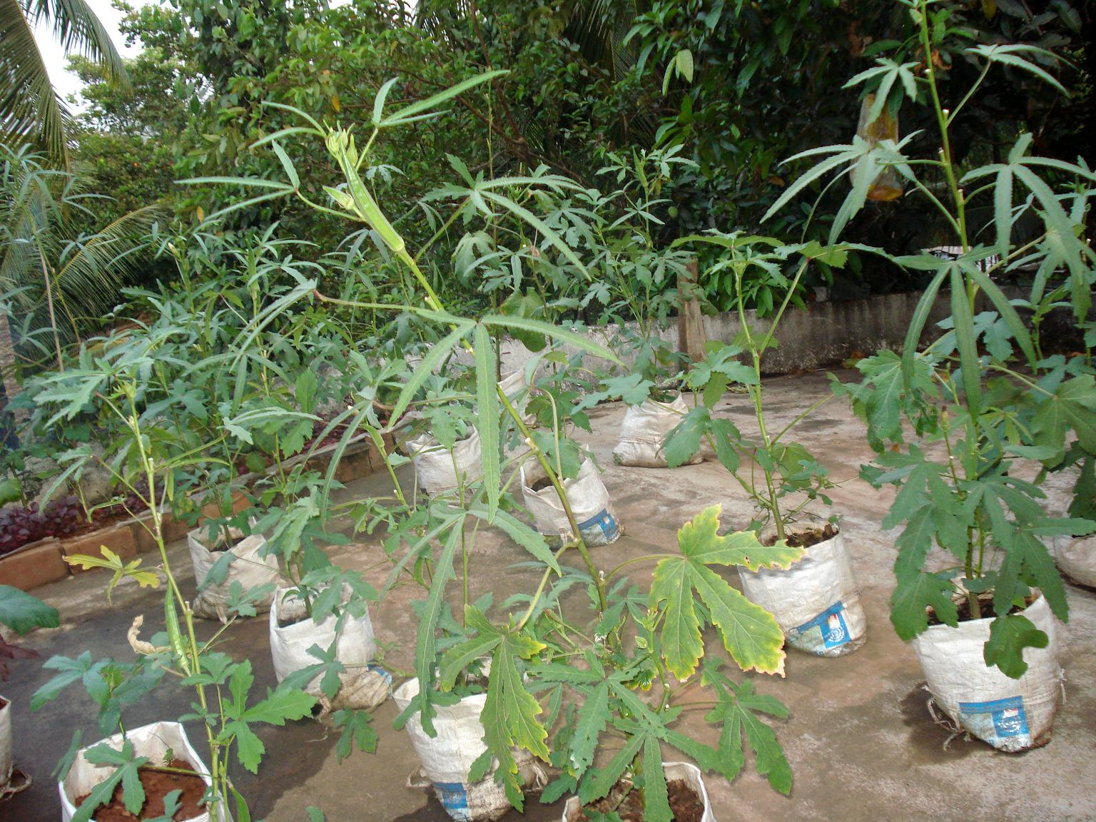 വെണ്ട Lady’s finger Name : Abelmoschus esculentus Family : Malvaceae മിക്കവാറും രാജ്യങ്ങളിൽ കൃഷിചെയ്യുന്നതും; പച്ചക്കറി വിഭാഗത്തിൽ ഉൾപ്പെടുന്ന കായ് ഉണ്ടാകുന്നതുമായ ഒരു സസ്യമാണ് വെണ്ട. ആംഗലേയത്തിൽ ഇതിനെ Okra , Lady's fingers എന്നീ പേരുകളിലും അറിയപ്പെടുന്നു.